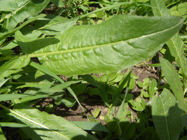 Wiesen-Sauerampfer (Rumex acetosa) - Leafs